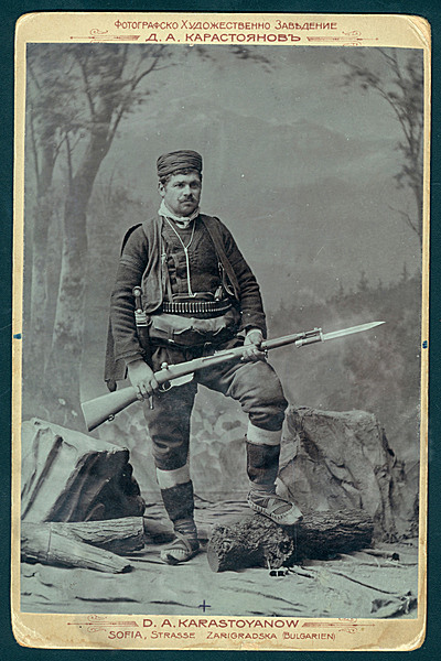 Атанас Тешовски.